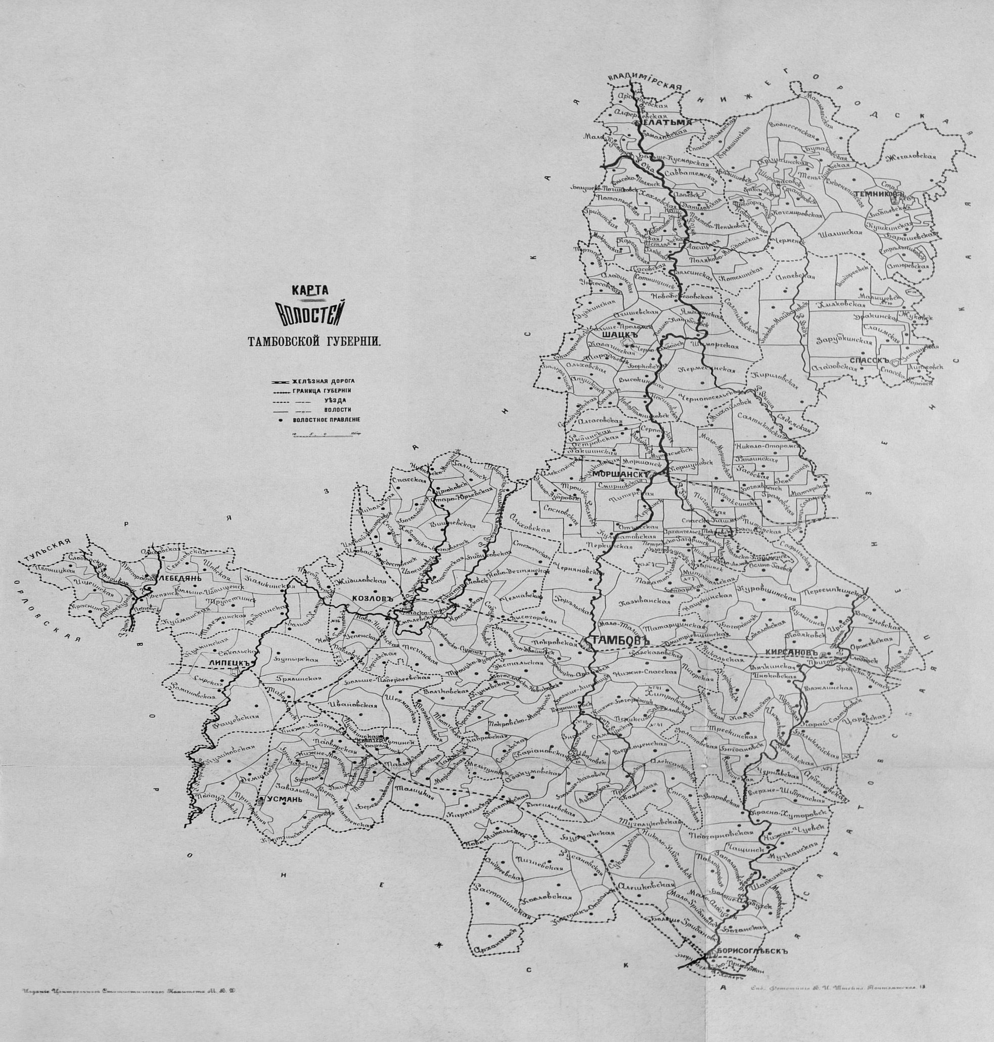 Карта волостей Тамбовской губернии